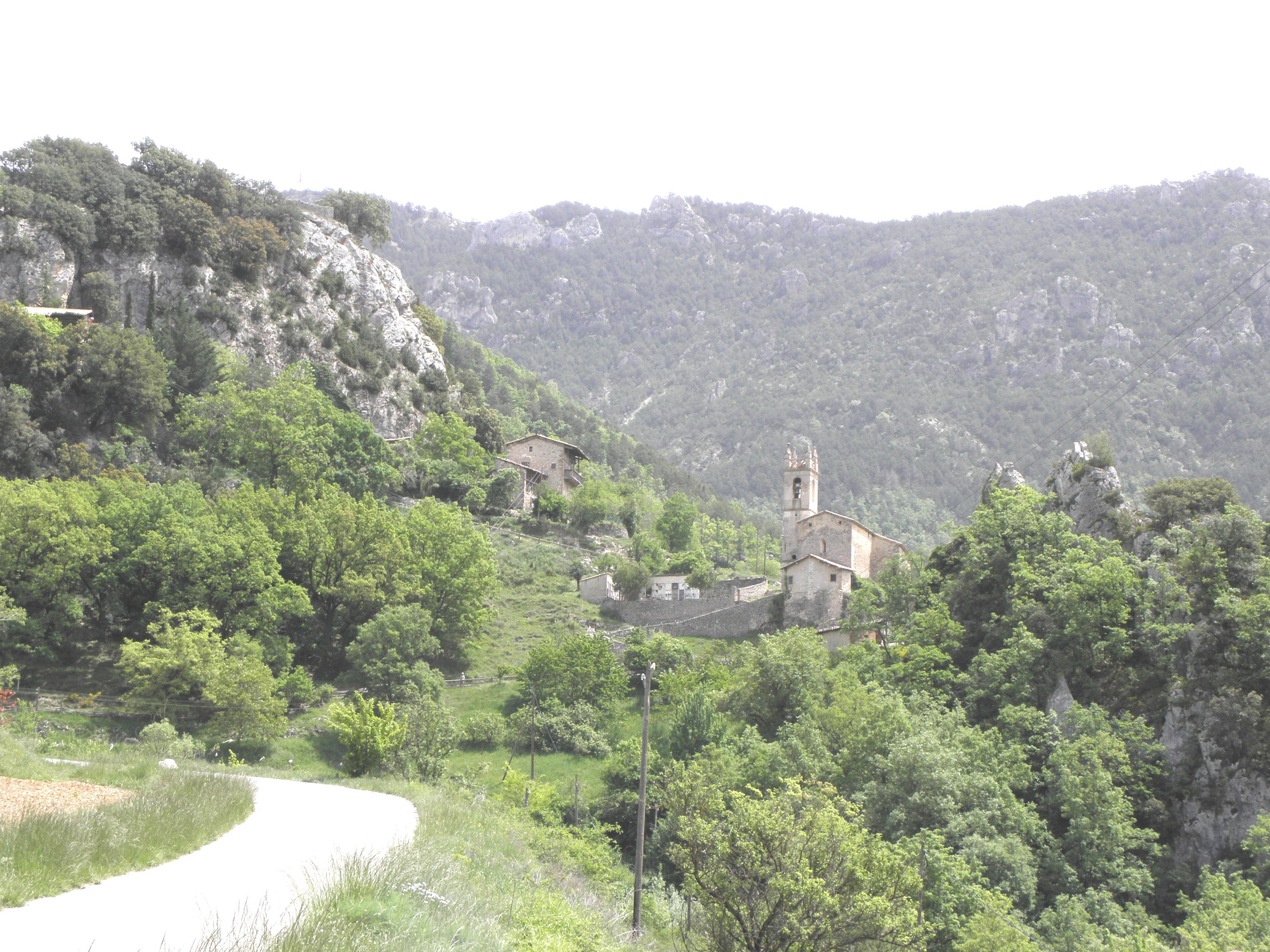 El poble de la Pedra, municipi de la Coma i la Pedra (Solsonès) vist des de ponent. Al centre de la imatgr, l'església de Sant Serni o Sant Sadurníde la Pedra. A l'esquerra de la mateixa, el rec de Roc de la Pedra amb les restes del mur del castell que s'hi bastí al cim. A la dreta de l'església, la Penya de la Rectoria. Al fons, la Serra de Pratformiu